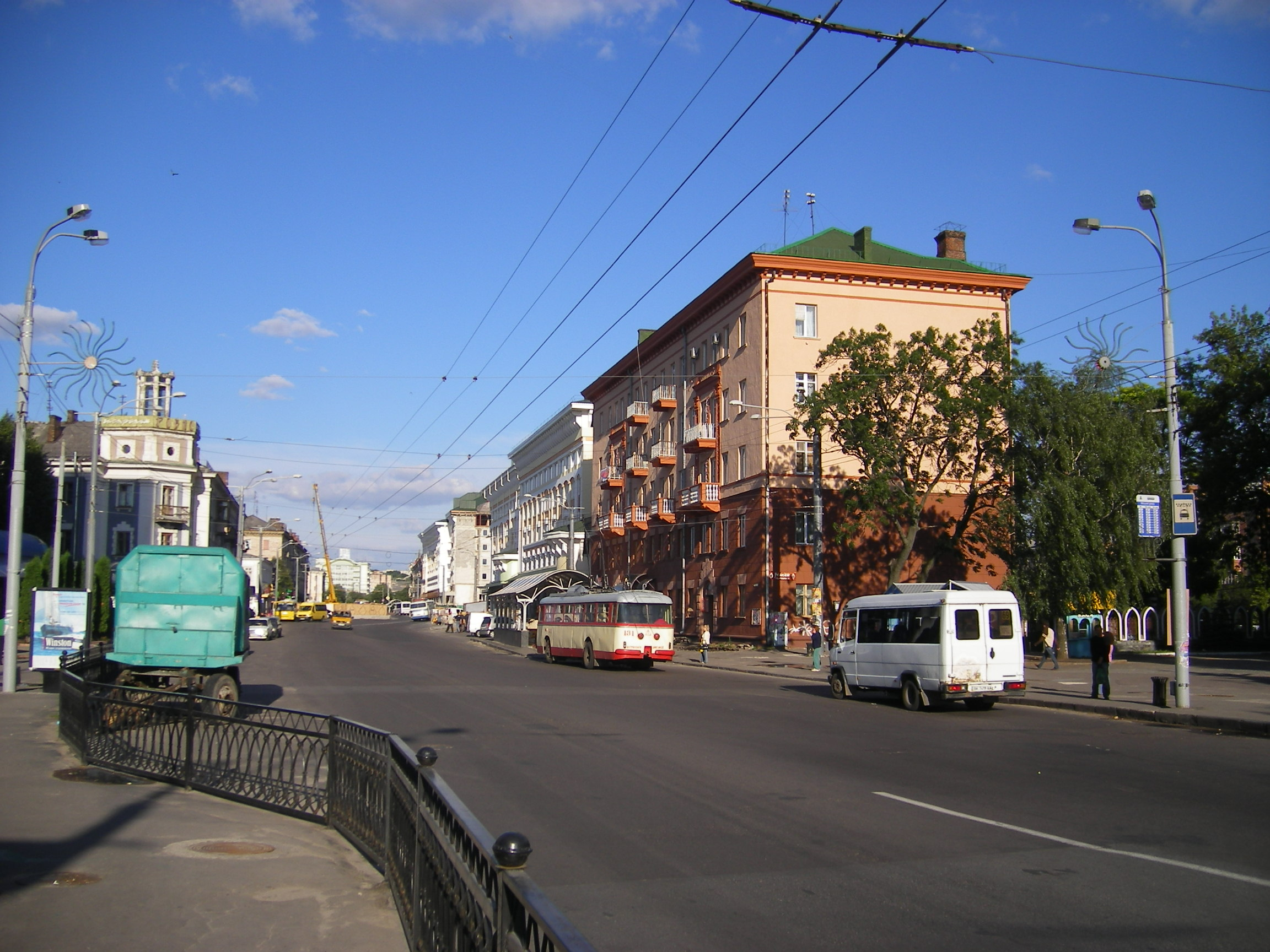 Rivne, Soborna street